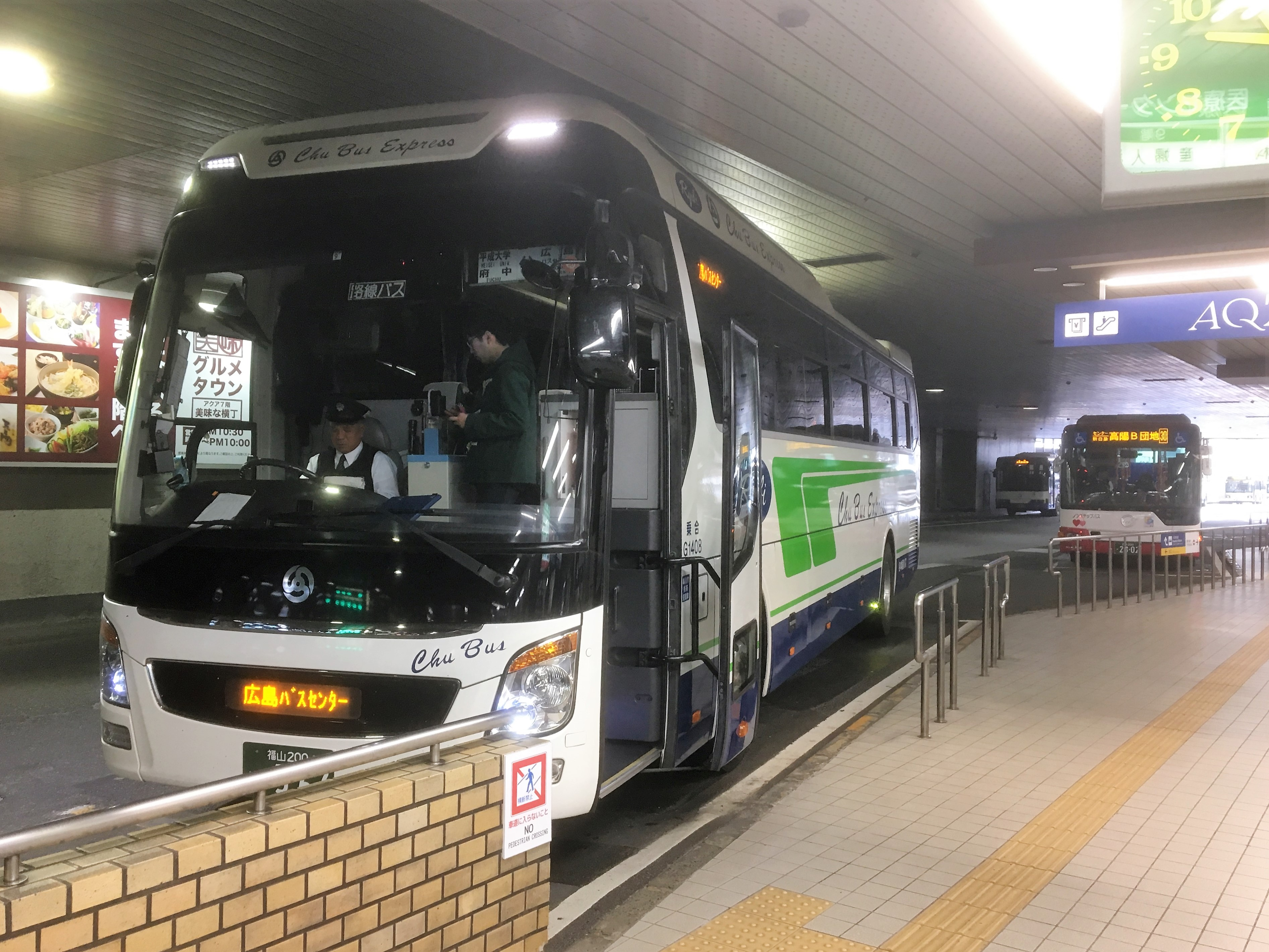 広島市、広島バスセンタービル3階の発着フロアの到着側。中国バス リードライナー